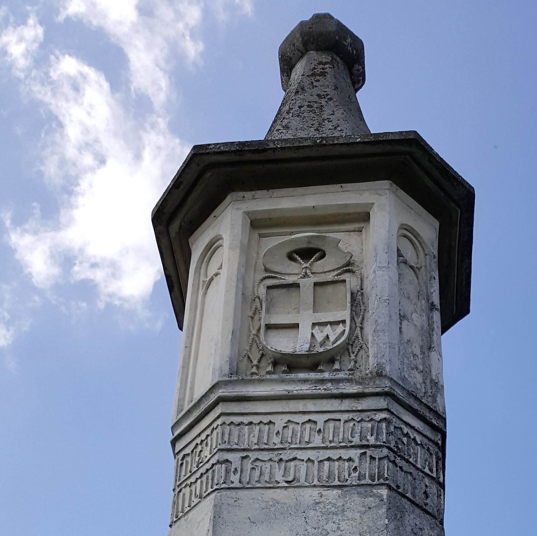 Słup graniczny w Biskupicach Radłowskich. Herb fundatora - Dębno.